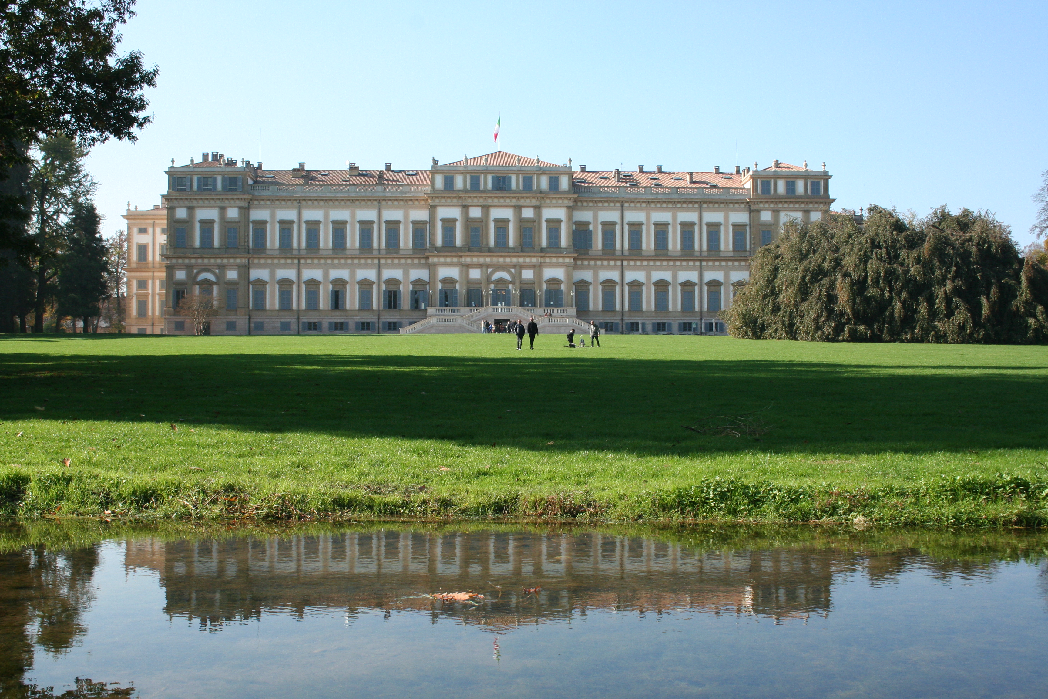 Facciata della villa Reale This is a photo of a monument which is part of cultural heritage of Italy.